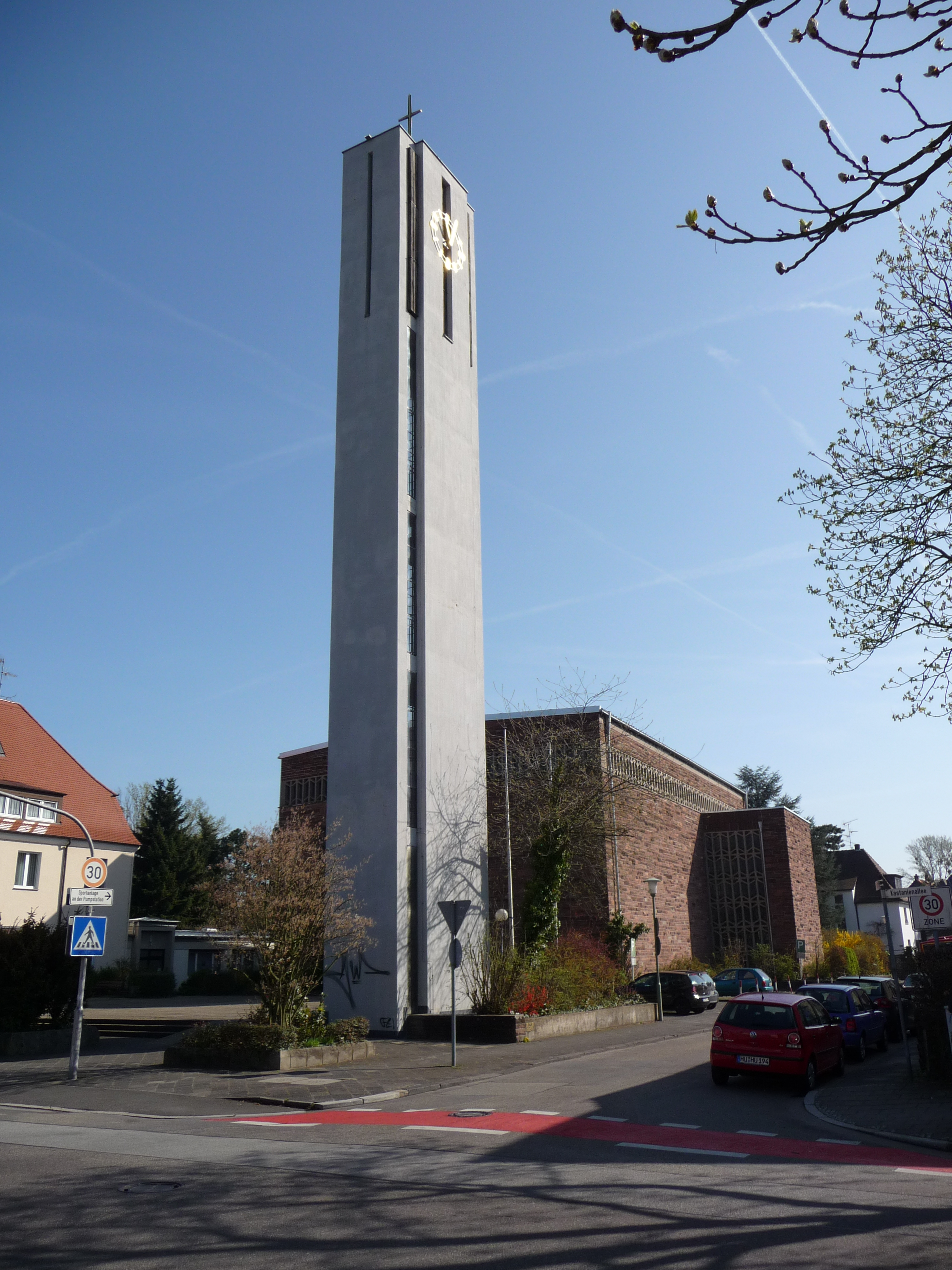 St. Elisabeth in Hanau-Kesselstadt